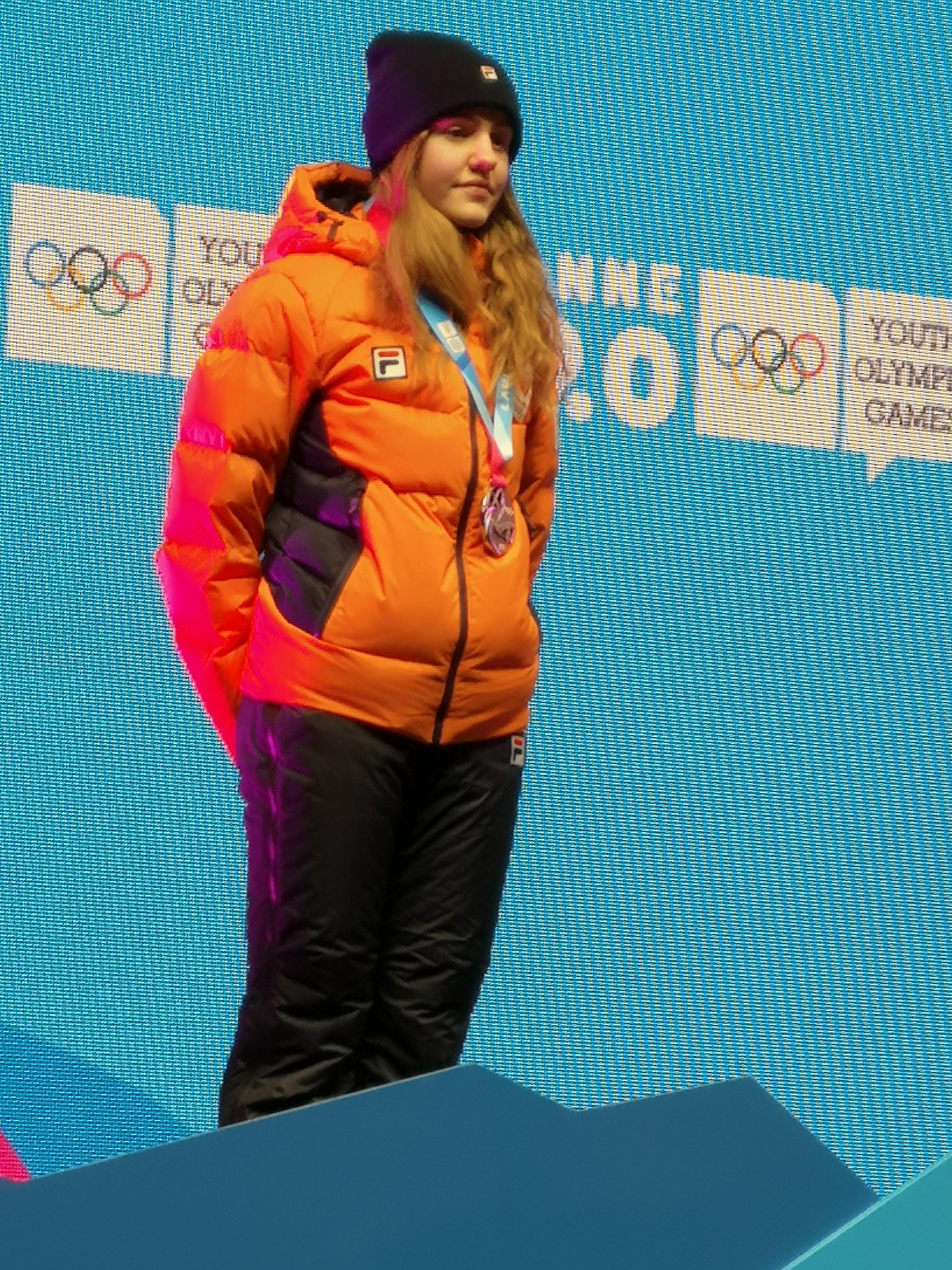 Michelle Velzeboer pendant la cérémonie de remise des médailles du 500 mètres féminin de patinage de vitesse sur piste courte des JOJ de Lausanne 2020.